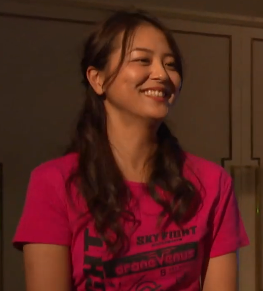 長沢美月です。